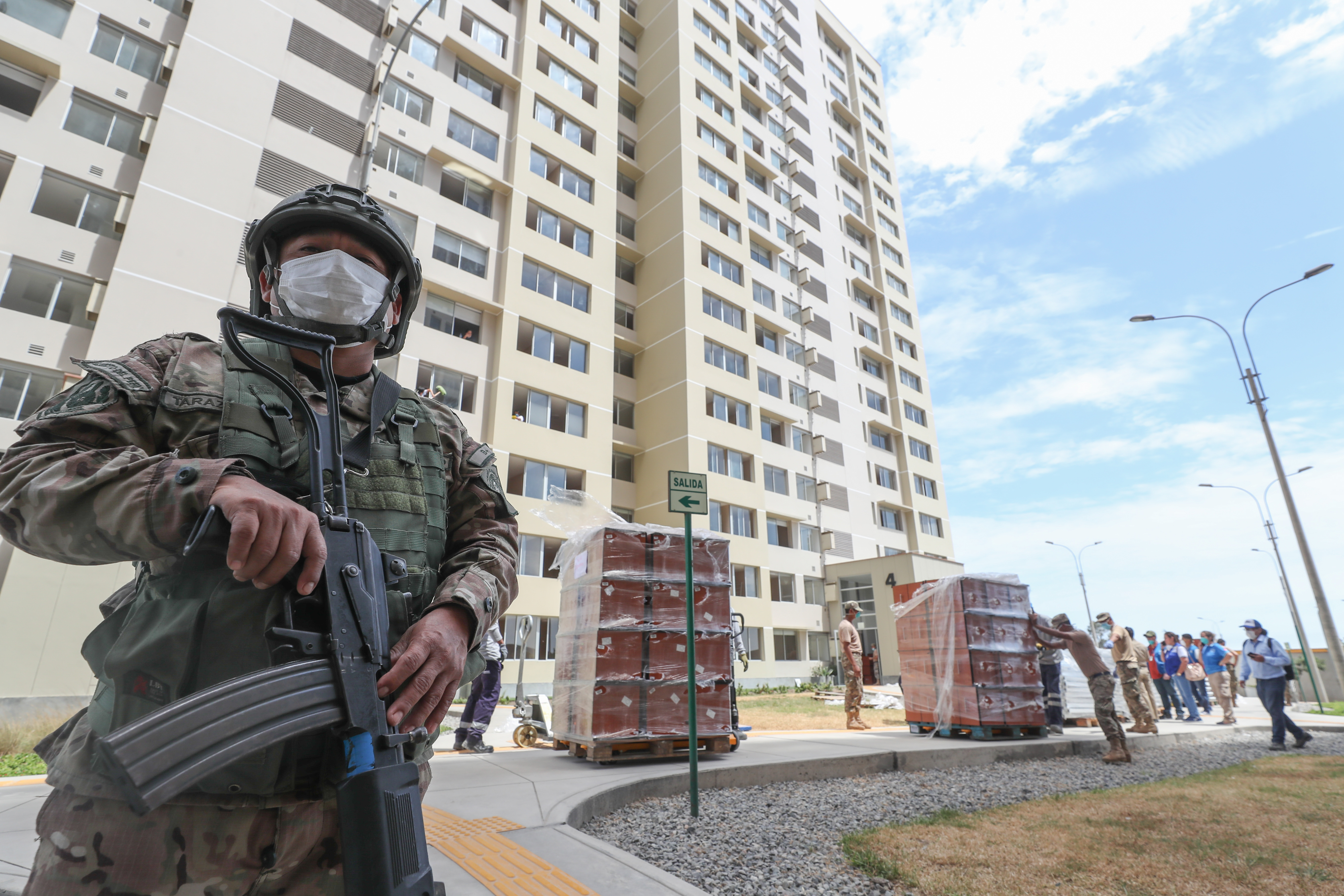 FFAA APOYAN EN IMPLEMENTACIÓN DE VILLA PANAMERICANA PARÁ PACIENTES CON COVID-19